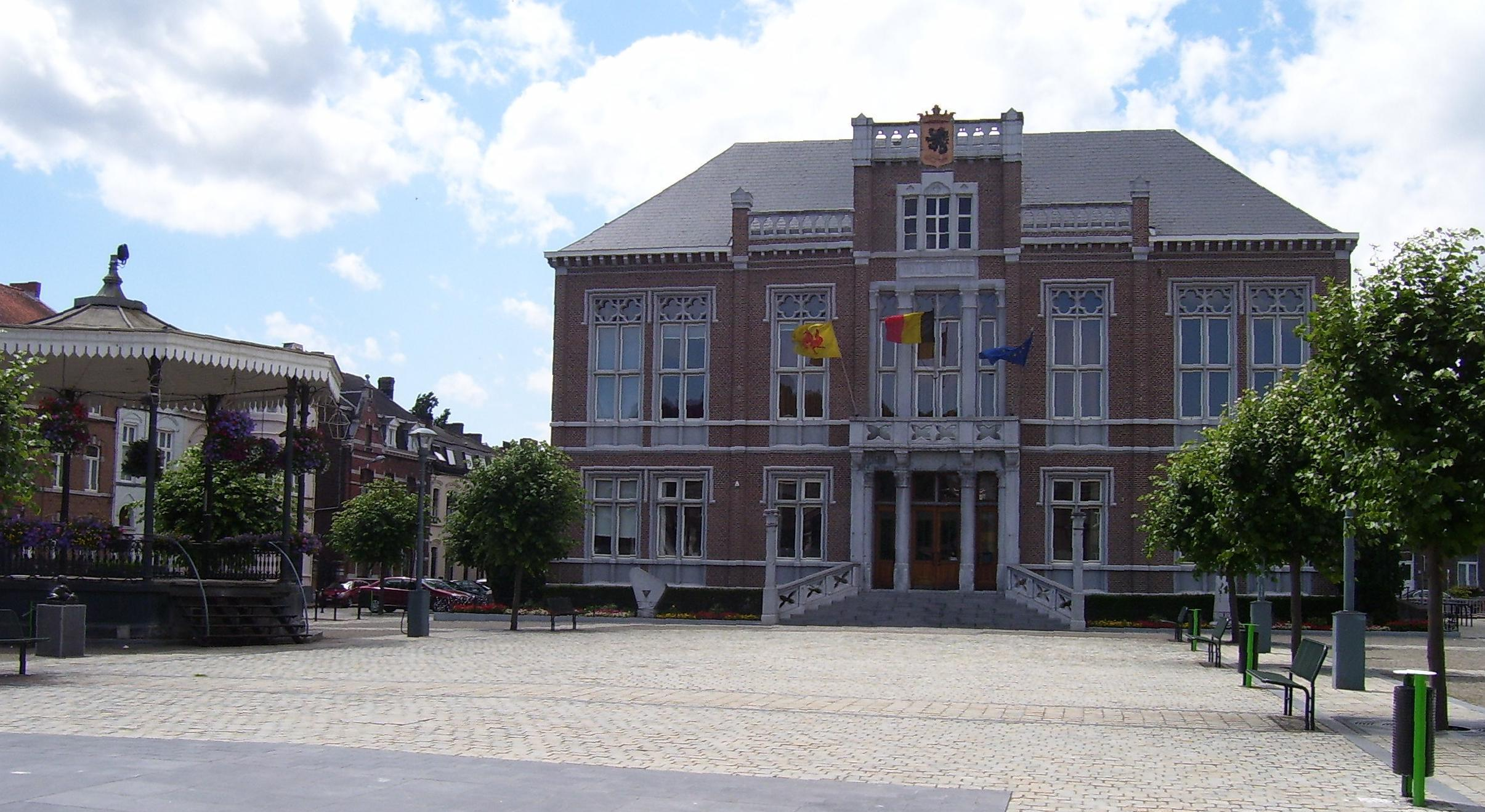 Hôtel de Ville (town hall) of Andenne, Place des Tilleuls, Belgium